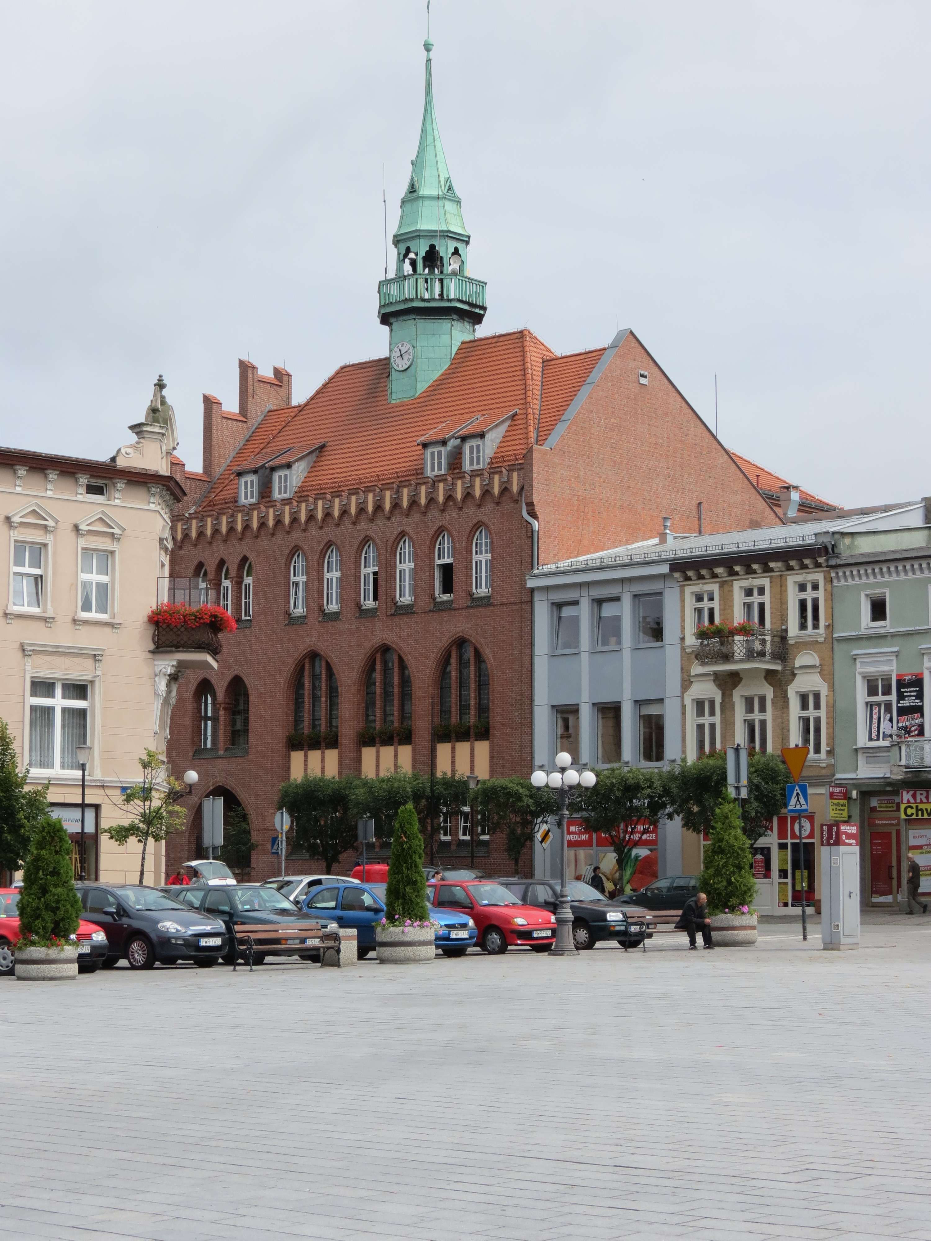 Września, ratusz, ob. UMiG, 1909-1910